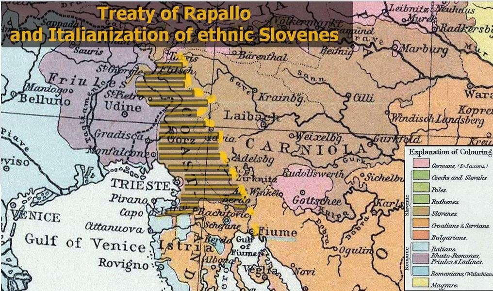 Area caratterizzata dalla presenza di popolazione di lingua madre slovena, assegnata al Regno d'Italia in base al trattato di Rapallo.